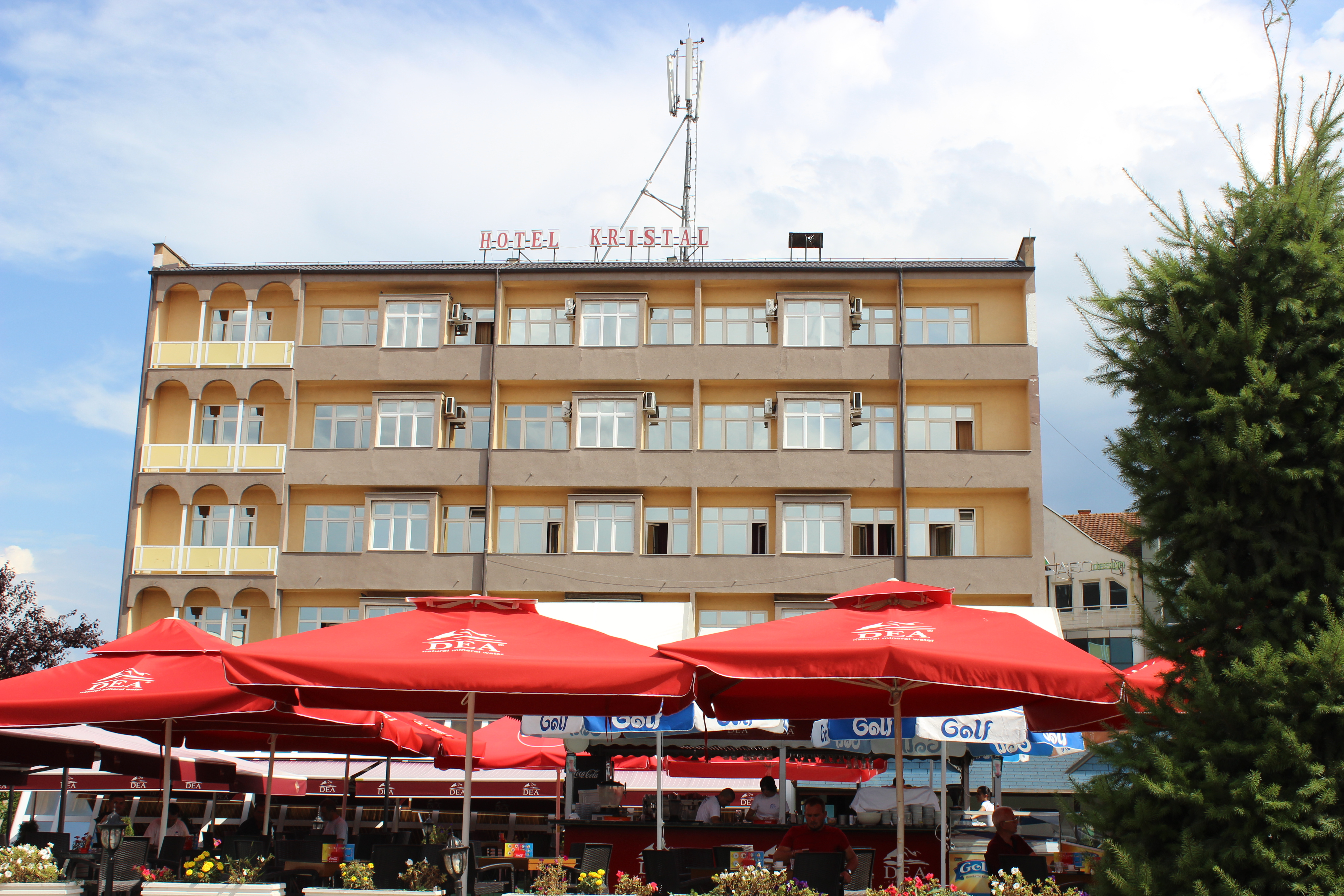 Hoteli Kristal, simbol i qytetit te Gjilanit